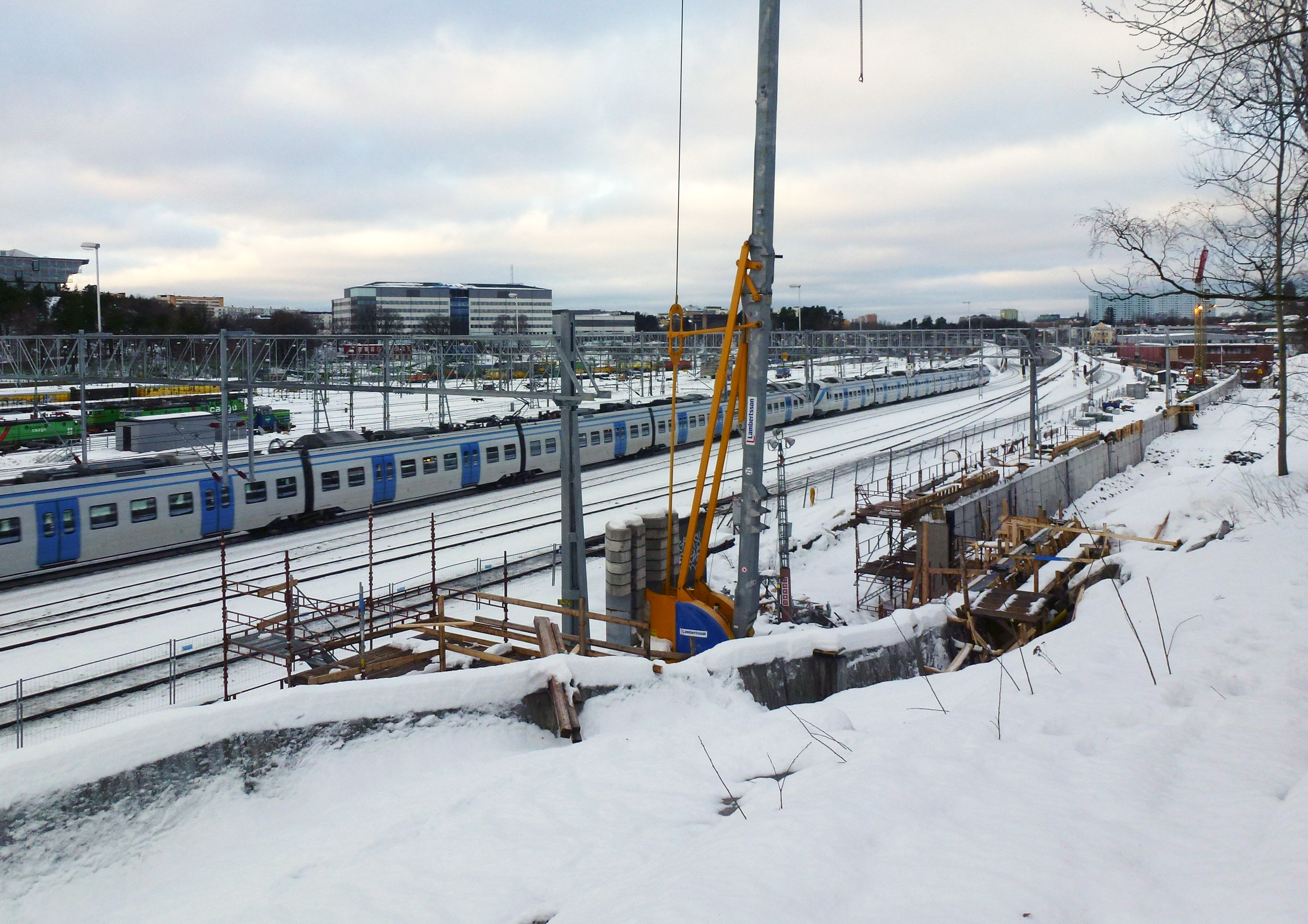 Tomteboda spårområde med mynningen av Tomteboda betongtunnel